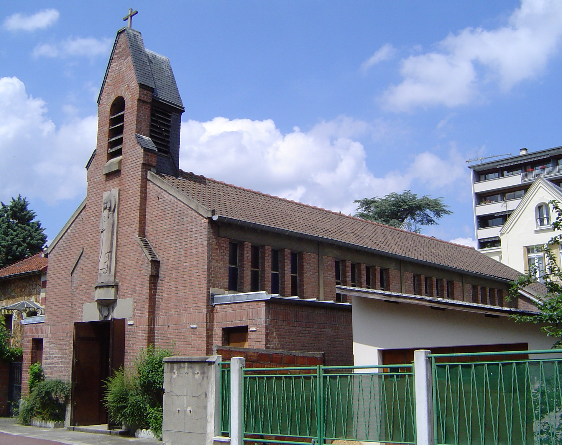 Eglise Sainte-Odile d'Antony.